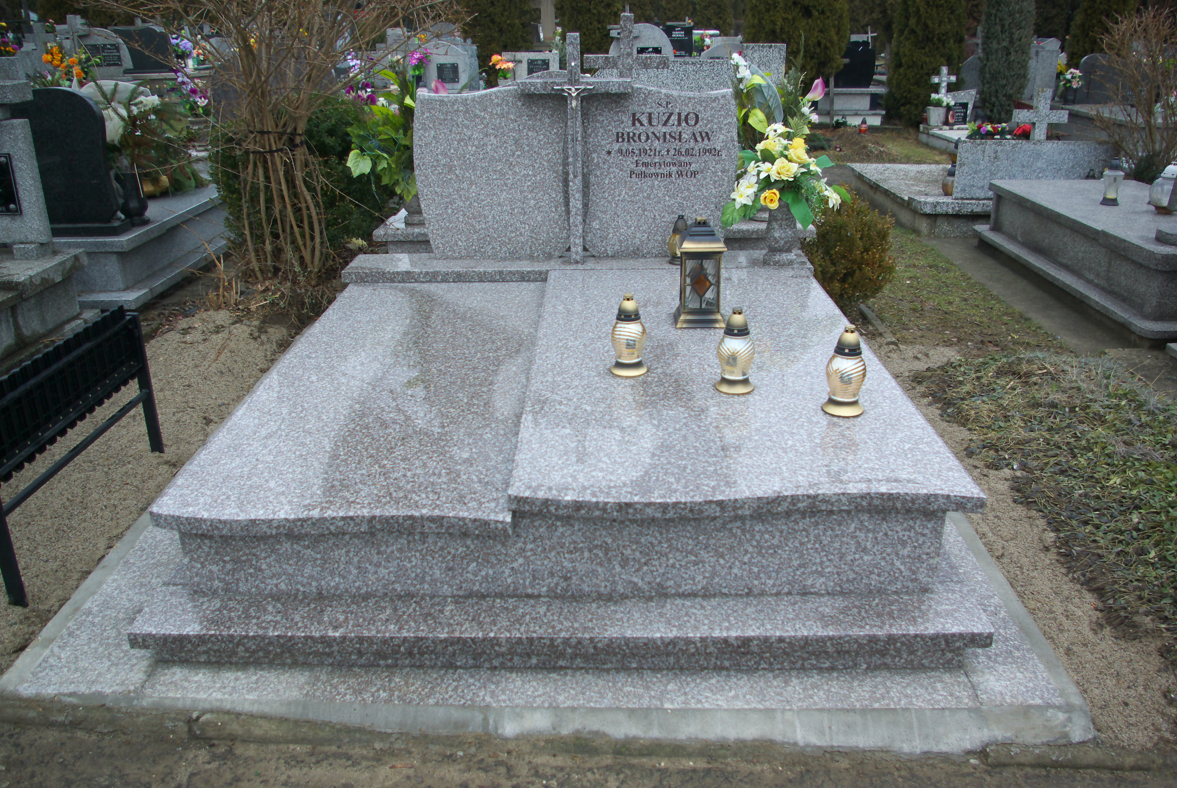 Nagrobek płk. Bronisława Kuzio po pogrzebie na Cmentarzu Centralnym w Sanoku.